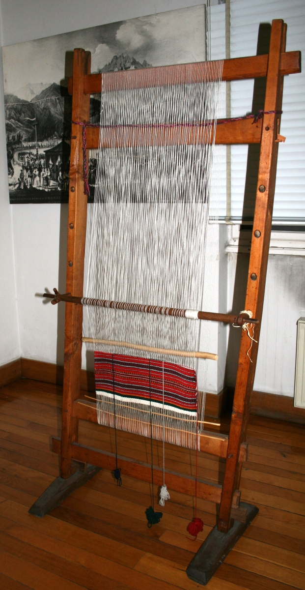 snimljeno tijekom Noći muzeja u Etnografskom muzeju u Zagrebu